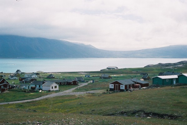 Narsarsuaq